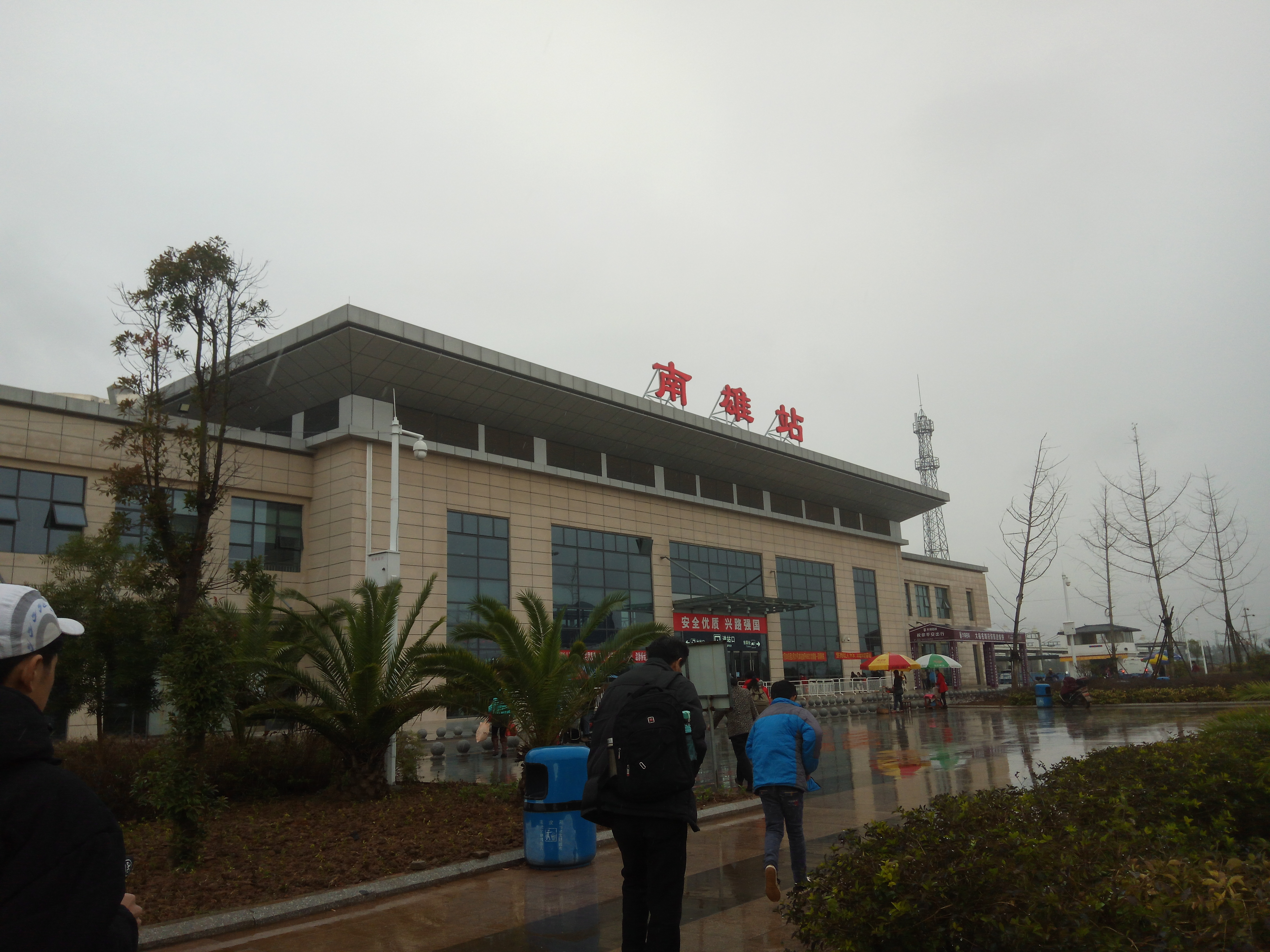 南雄市火车站